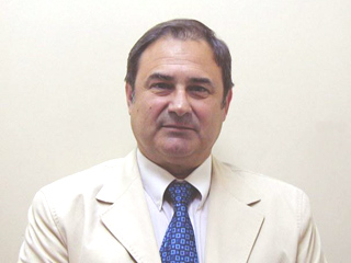 Luis Lusquiños, actual diputado de la Nación Argentina.